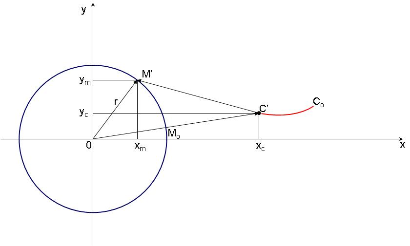 Schéma général courbe de poursuite avec trajectoire de fuite circulaire